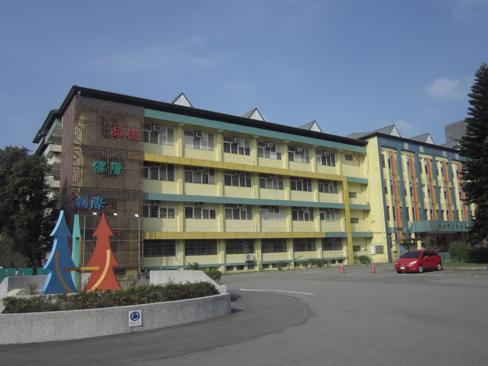 新北市立樹林高級中學教學行政大樓。